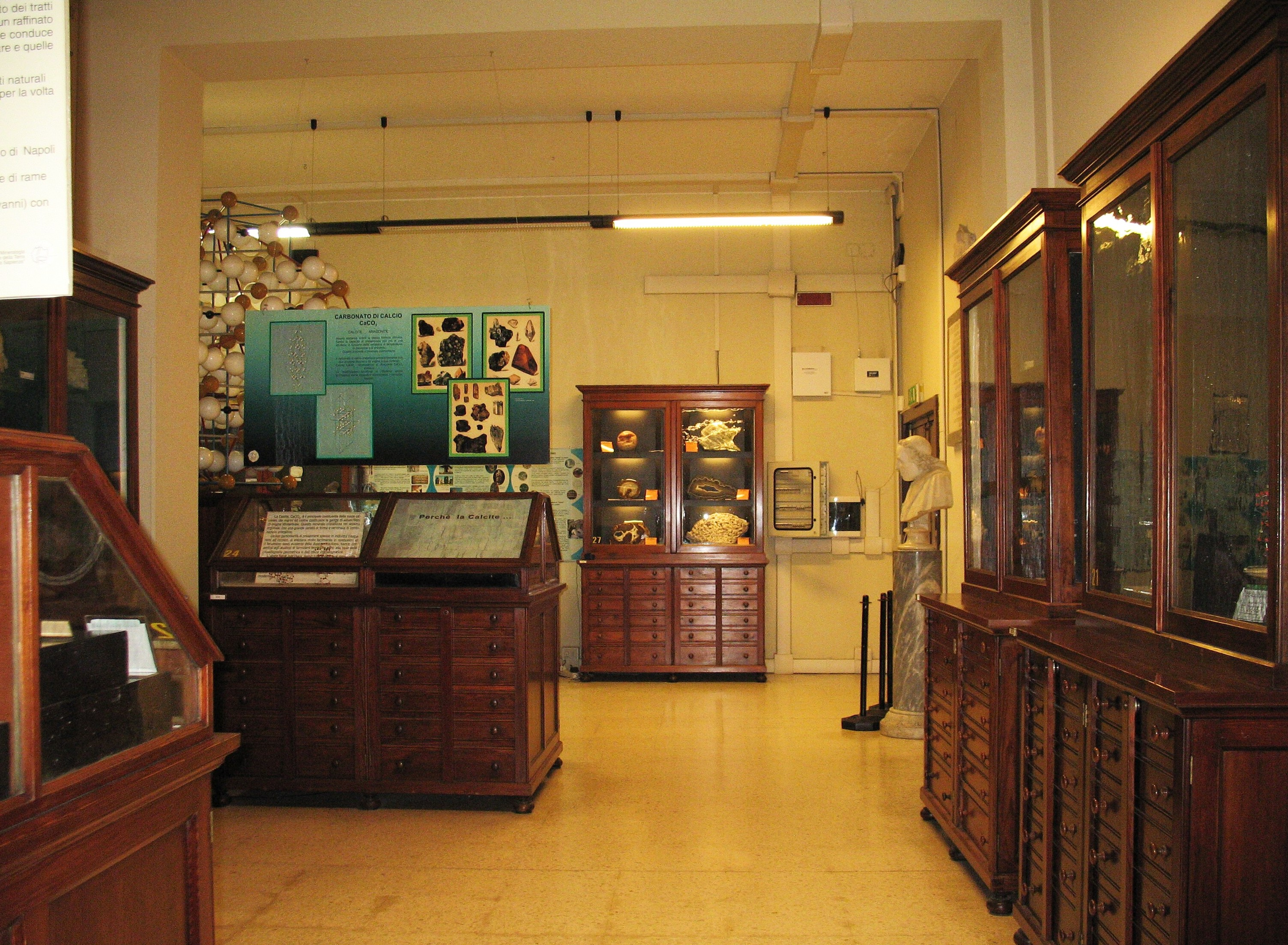 Hlavní sál expozice v suterénu muzea